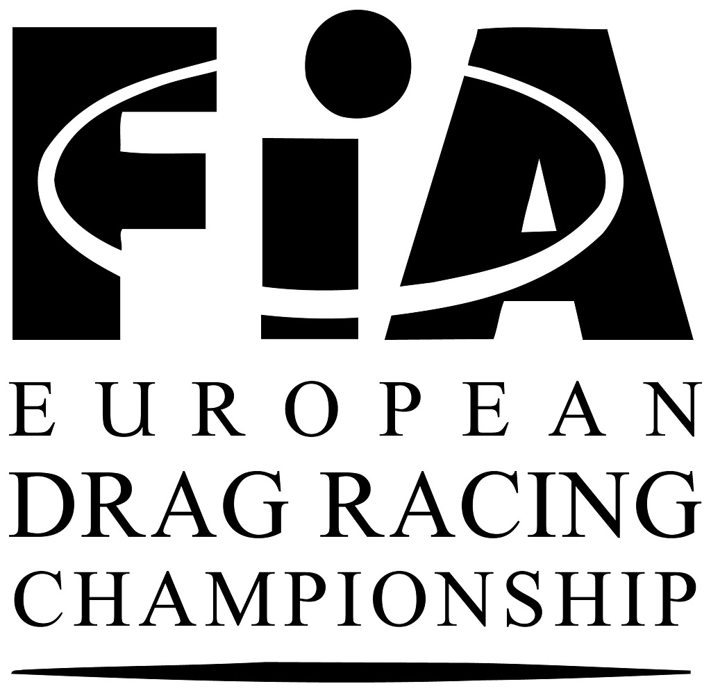 Logo der FIA European Drag Racing Championship